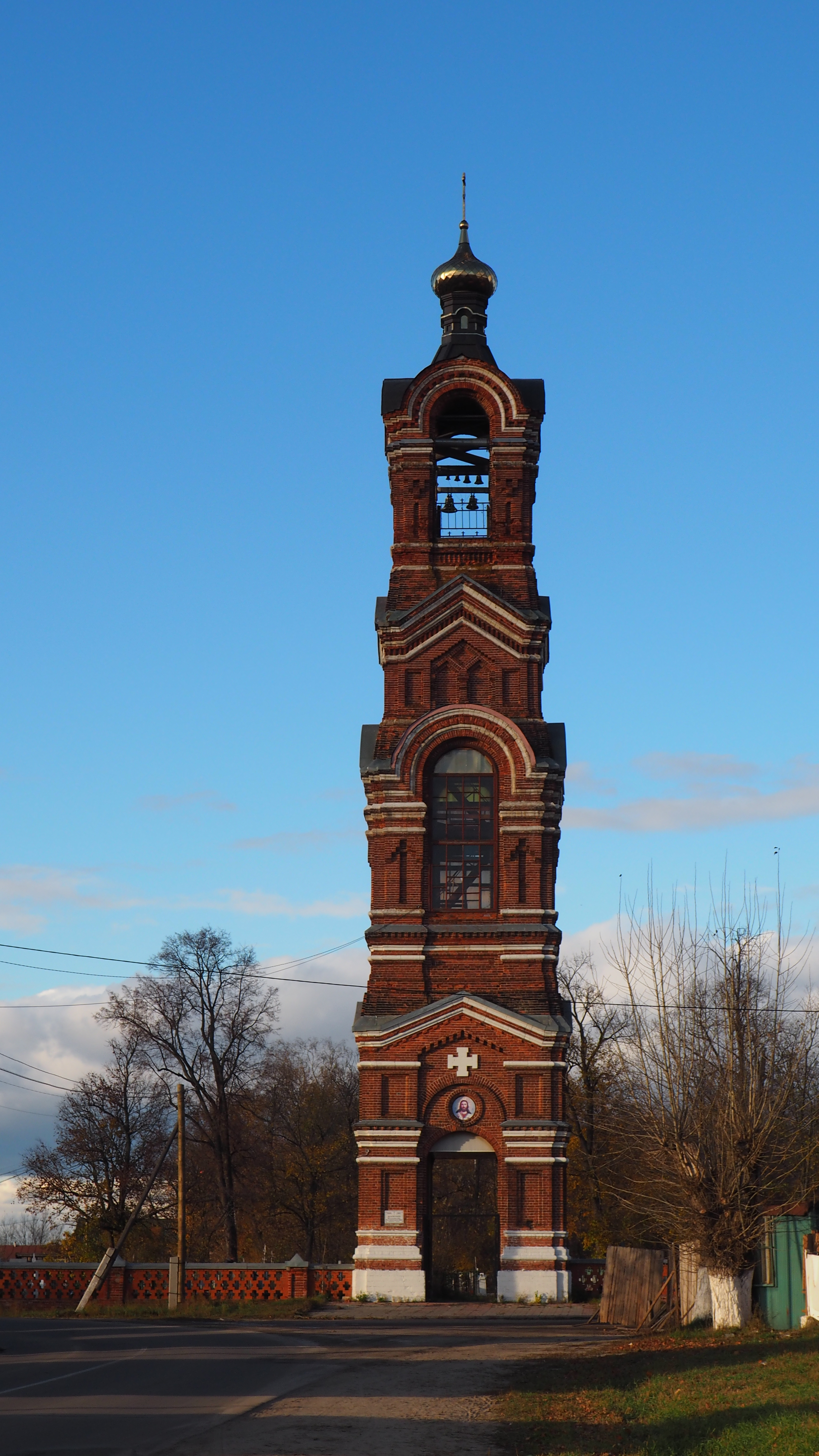 Колокольня: улица Ленина, городское кладбище, Меленки, Меленковский район, Владимирская область